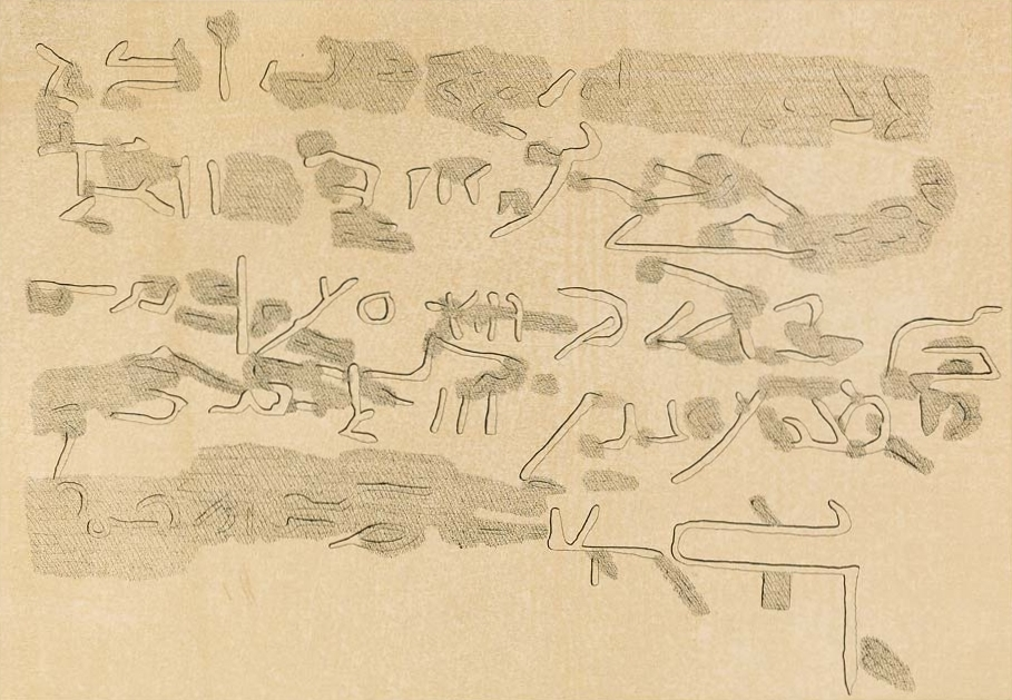 Abzeichnung einer demotischen Inschrift am Tempel von Maharraka in Unternubien, Ägypten